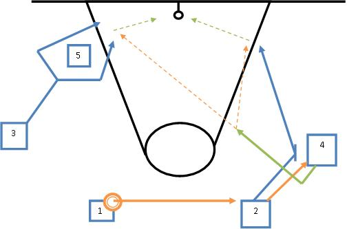 Zagrywka koszykarska (teoria)